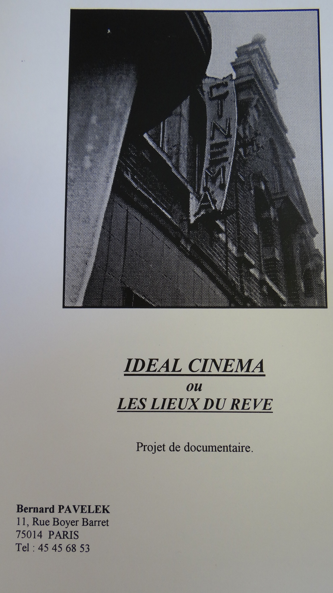 Idéal Cinéma - documentaire de Bernard Pavelek archives de l' histoire locale d'Aniche